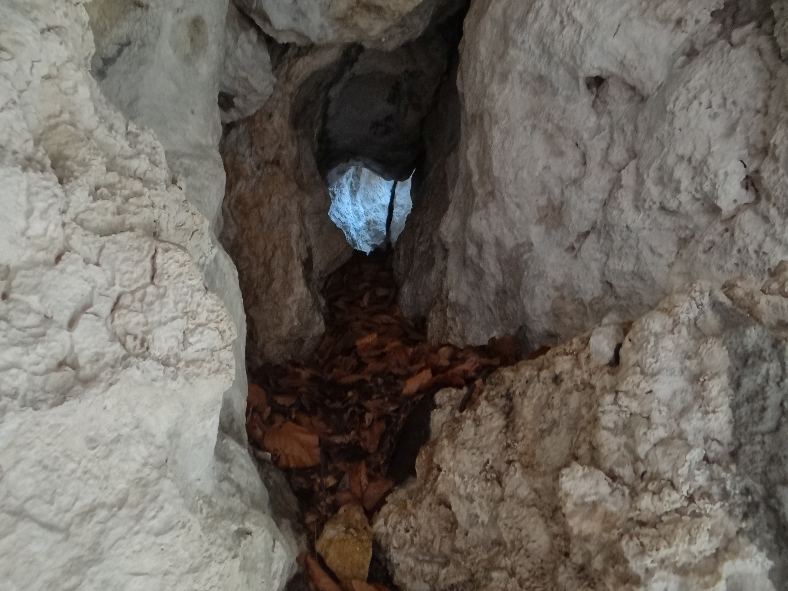 Schronisko Żarskie I w Dolinie Racławki